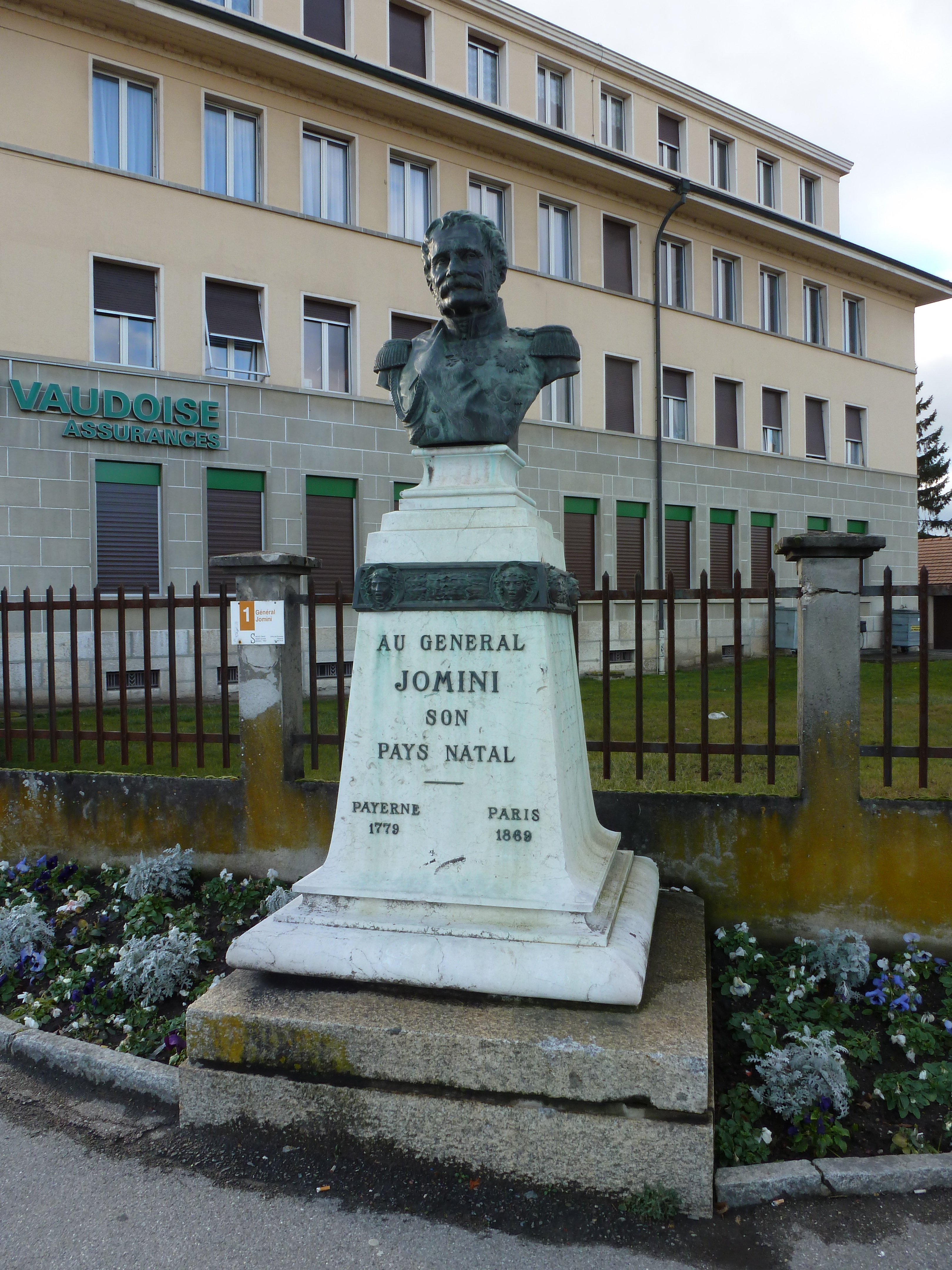 Denkmal für Antoine-Henri Jomini in Payerne (heute verschoben an die Place Général Jomini)